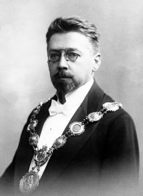 architekt Karel Hugo Kepka